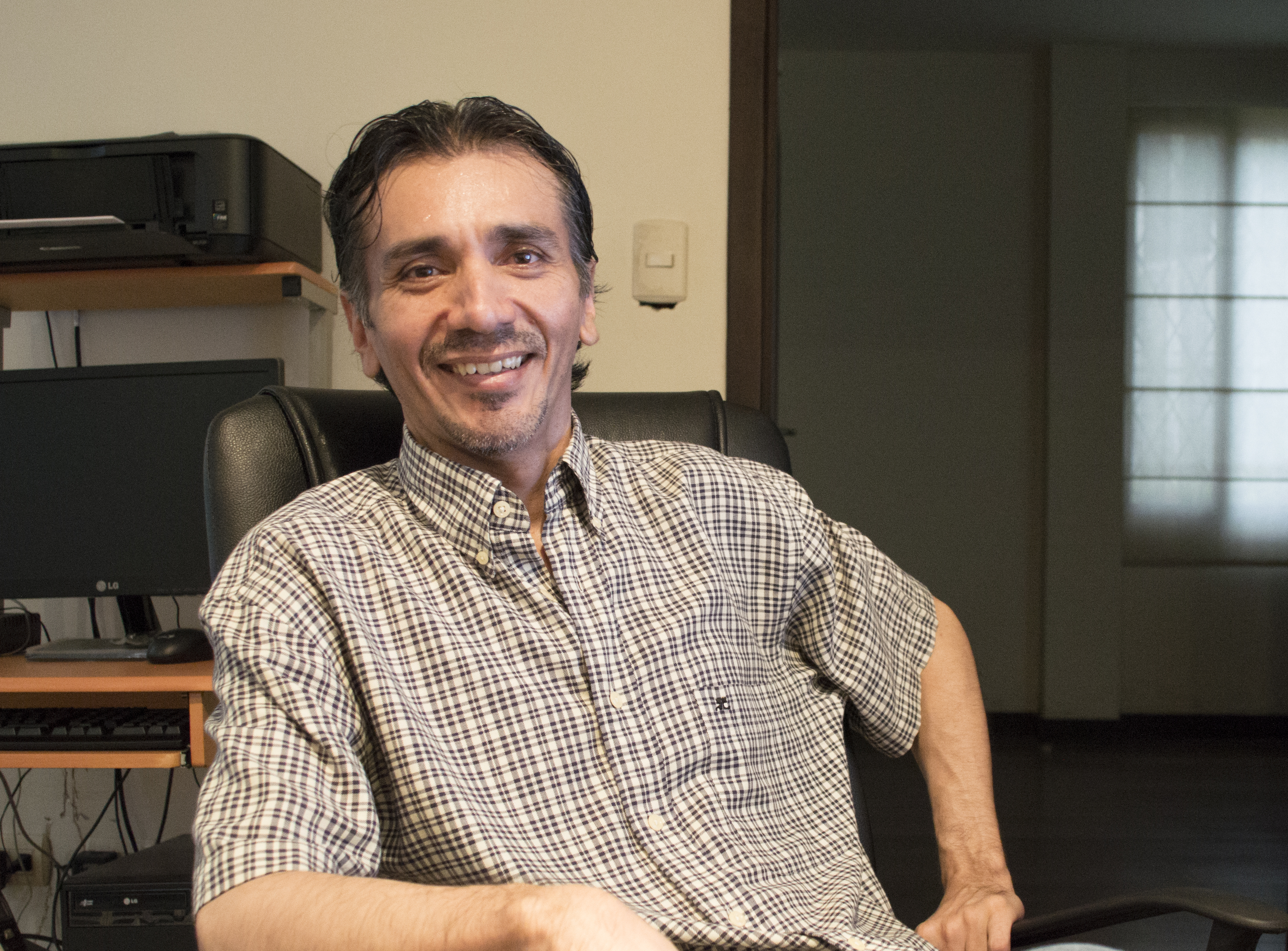 Jorge Toledo Orbe en 2016.